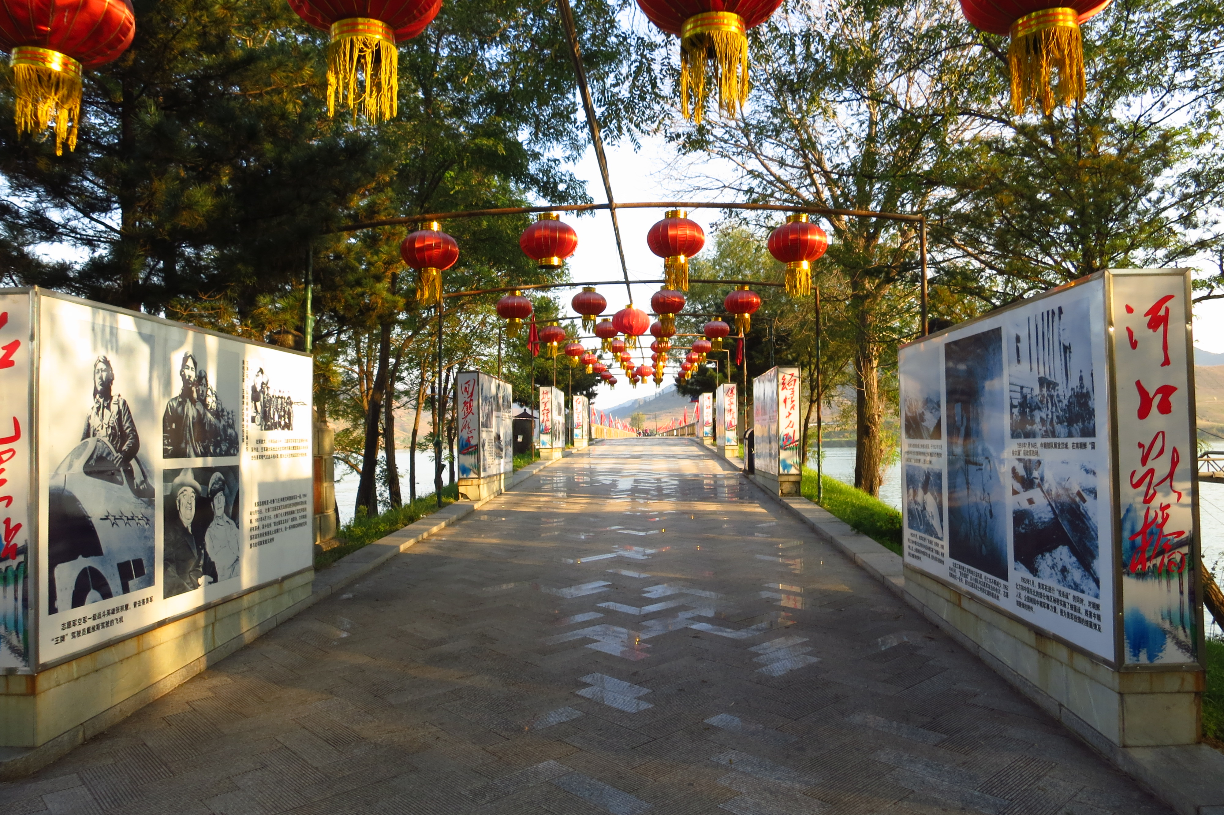 巡道工出品 photo by xundaogong